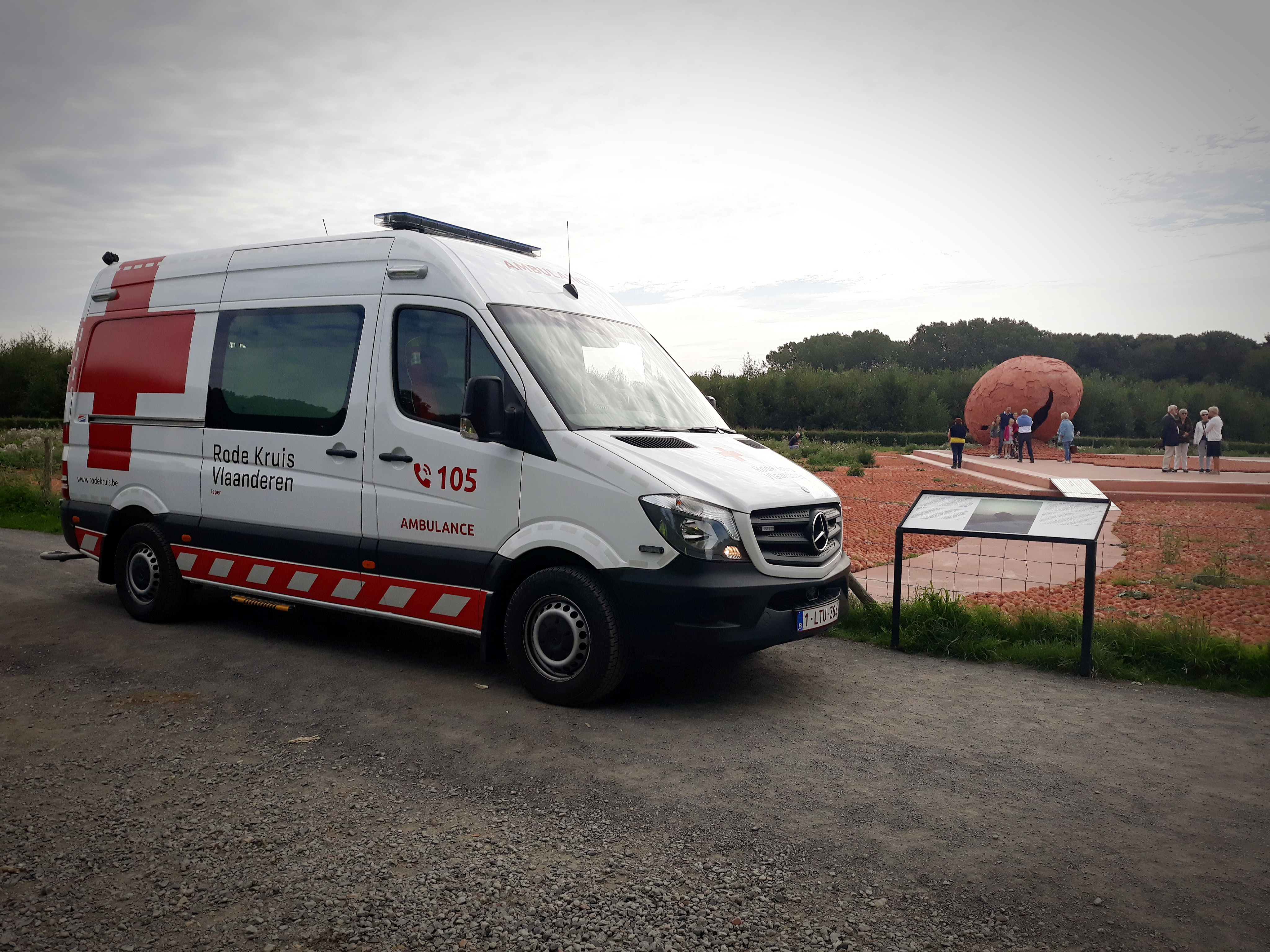 Ziekenwagen Rode Kruis Ieper bij het ComingWorldRememberMe monument in de Palingfbeek